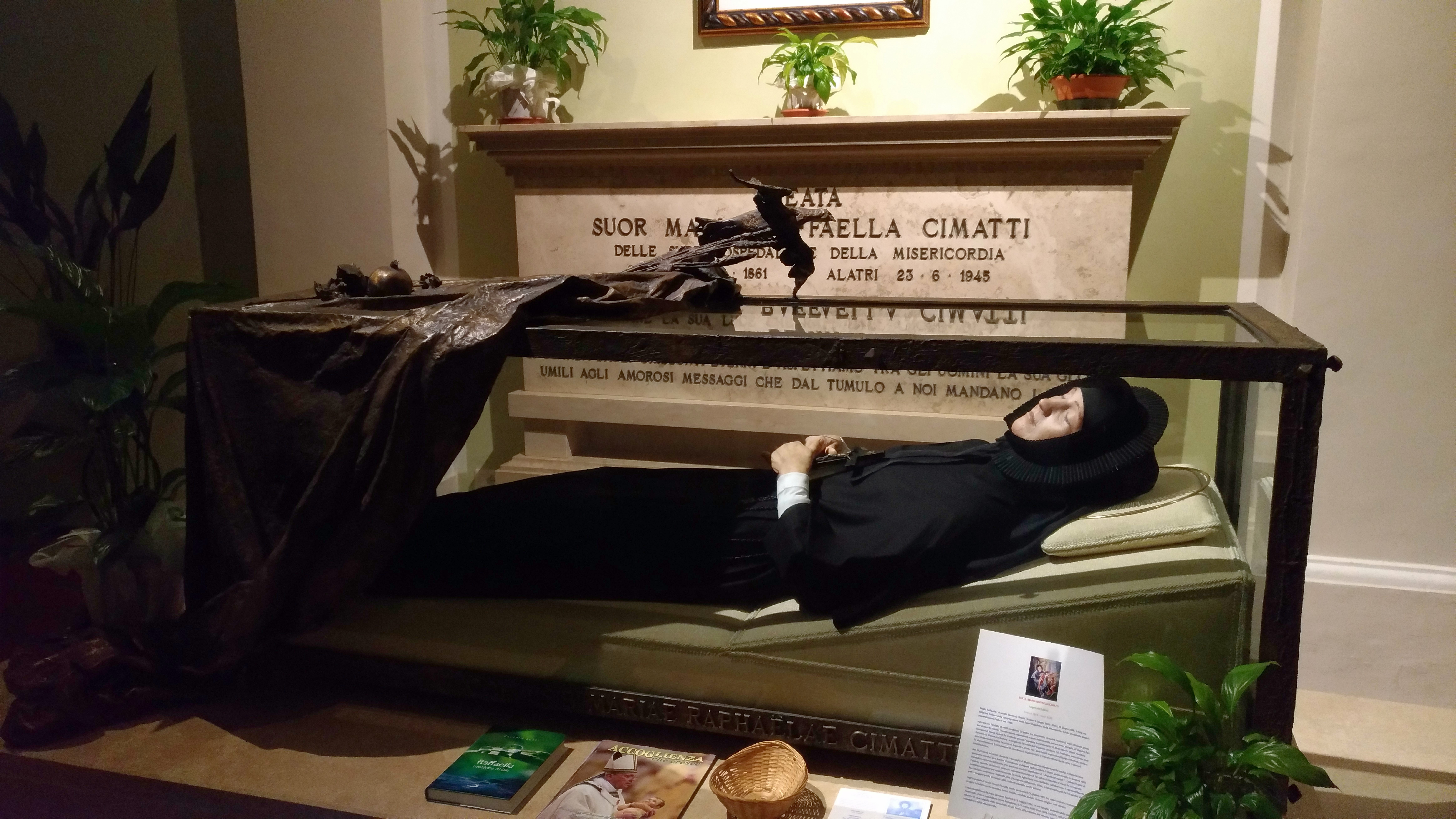 Maria Raffaella Cimatti